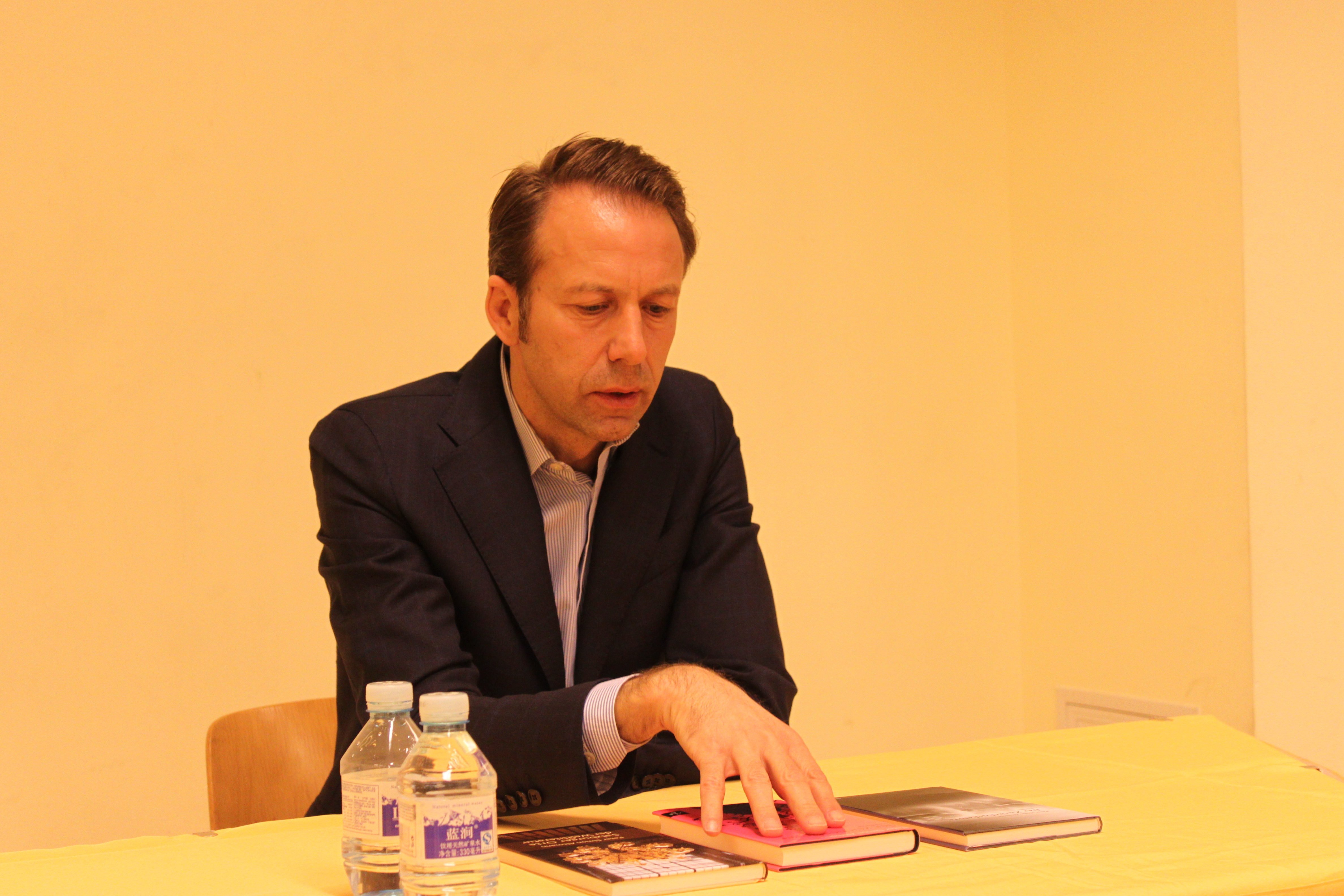 Peter Simon Altmann bei einer Lesung